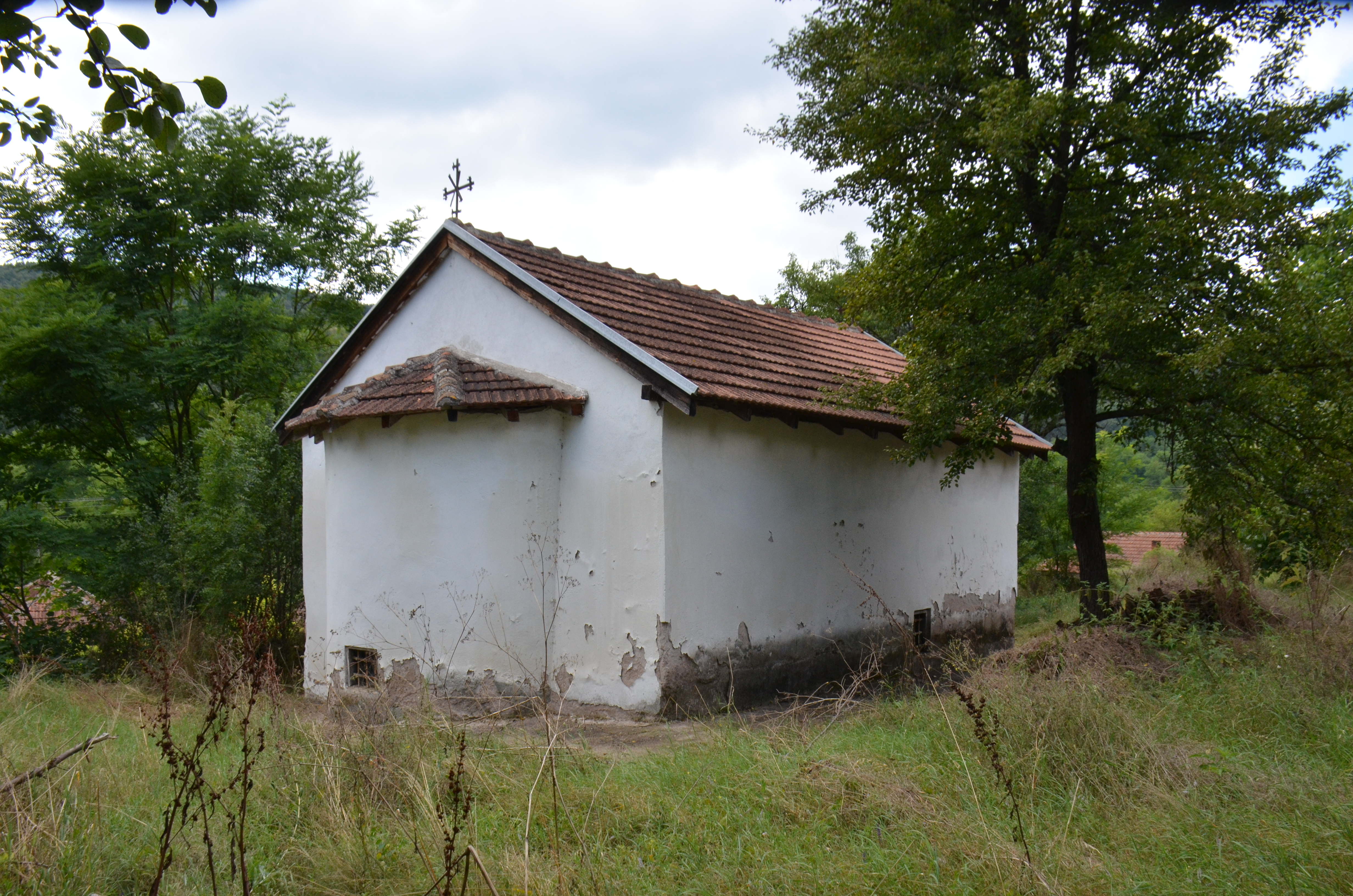 Црква Светог Ђорђа, село Осмаково, општина Пирот, Пиротски округ